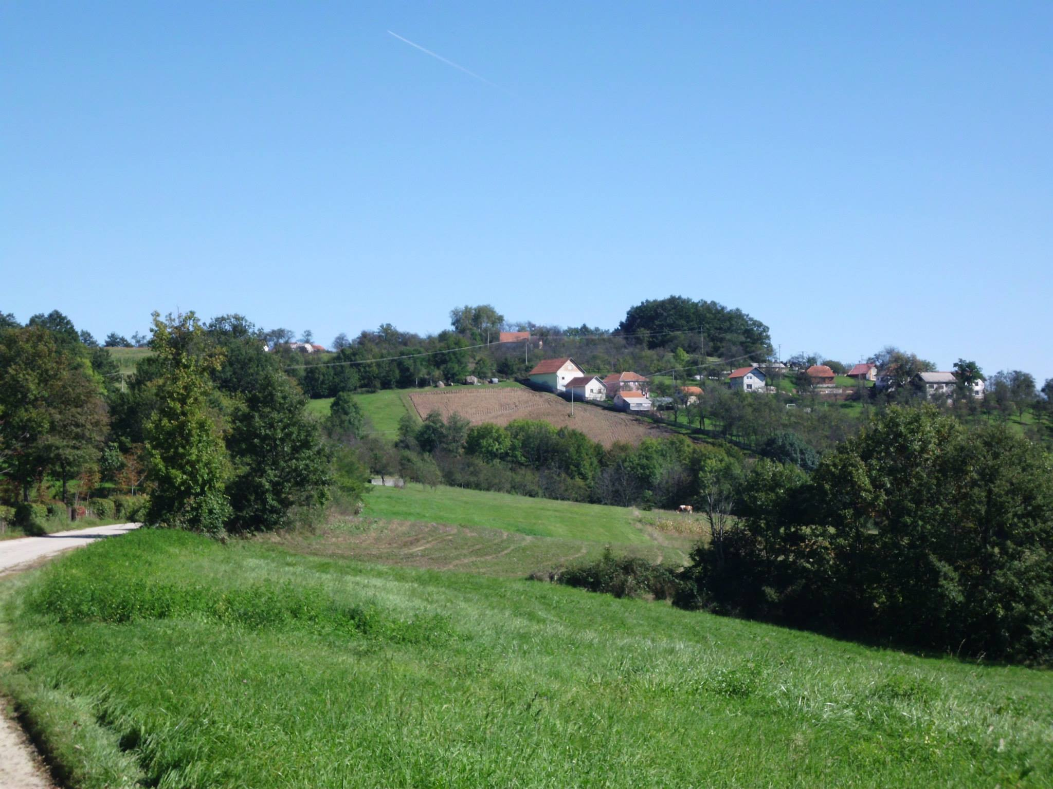 Selo Ljubanje, 10km udaljeno od Užica